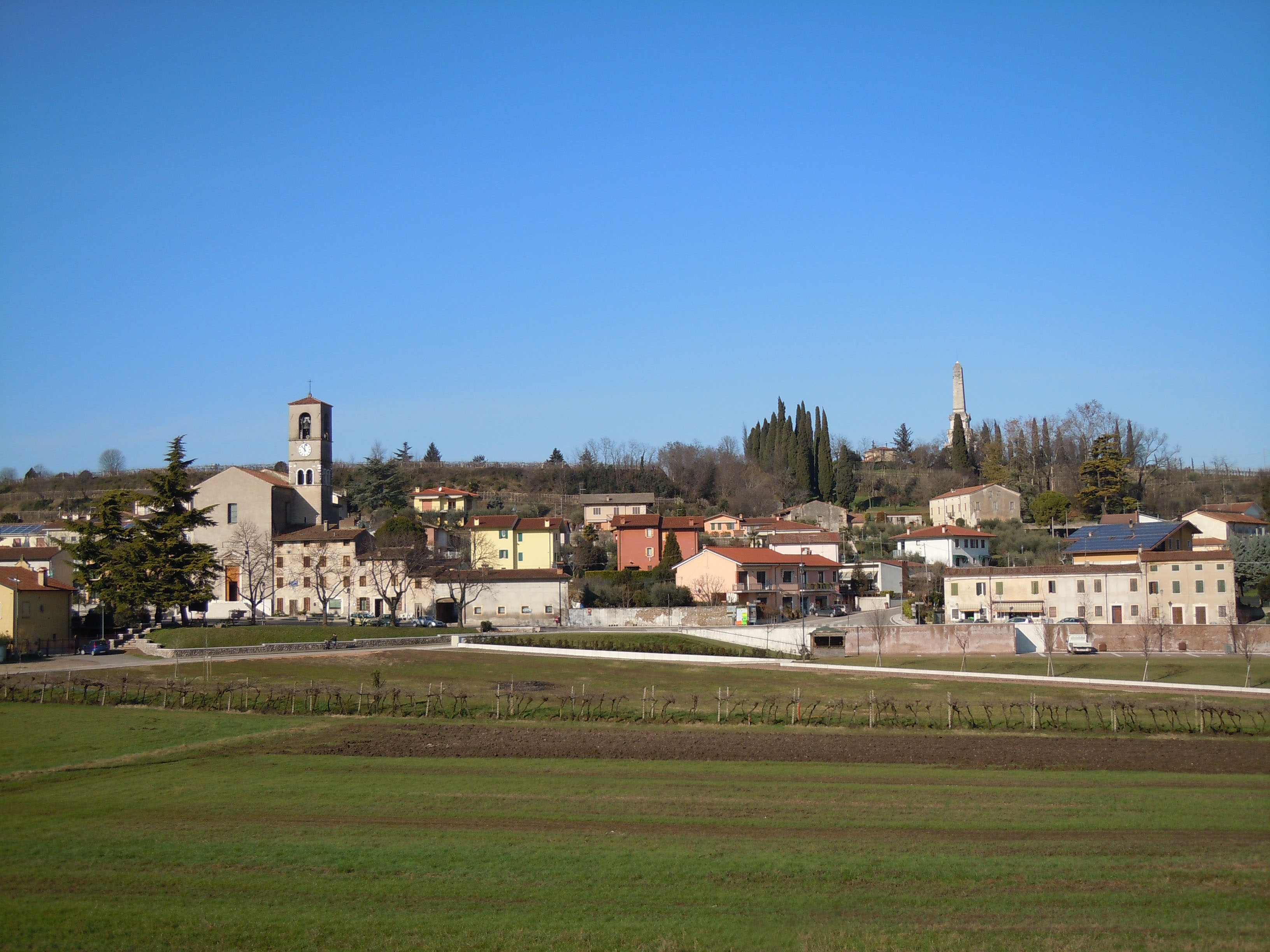 Custoza, panorama.